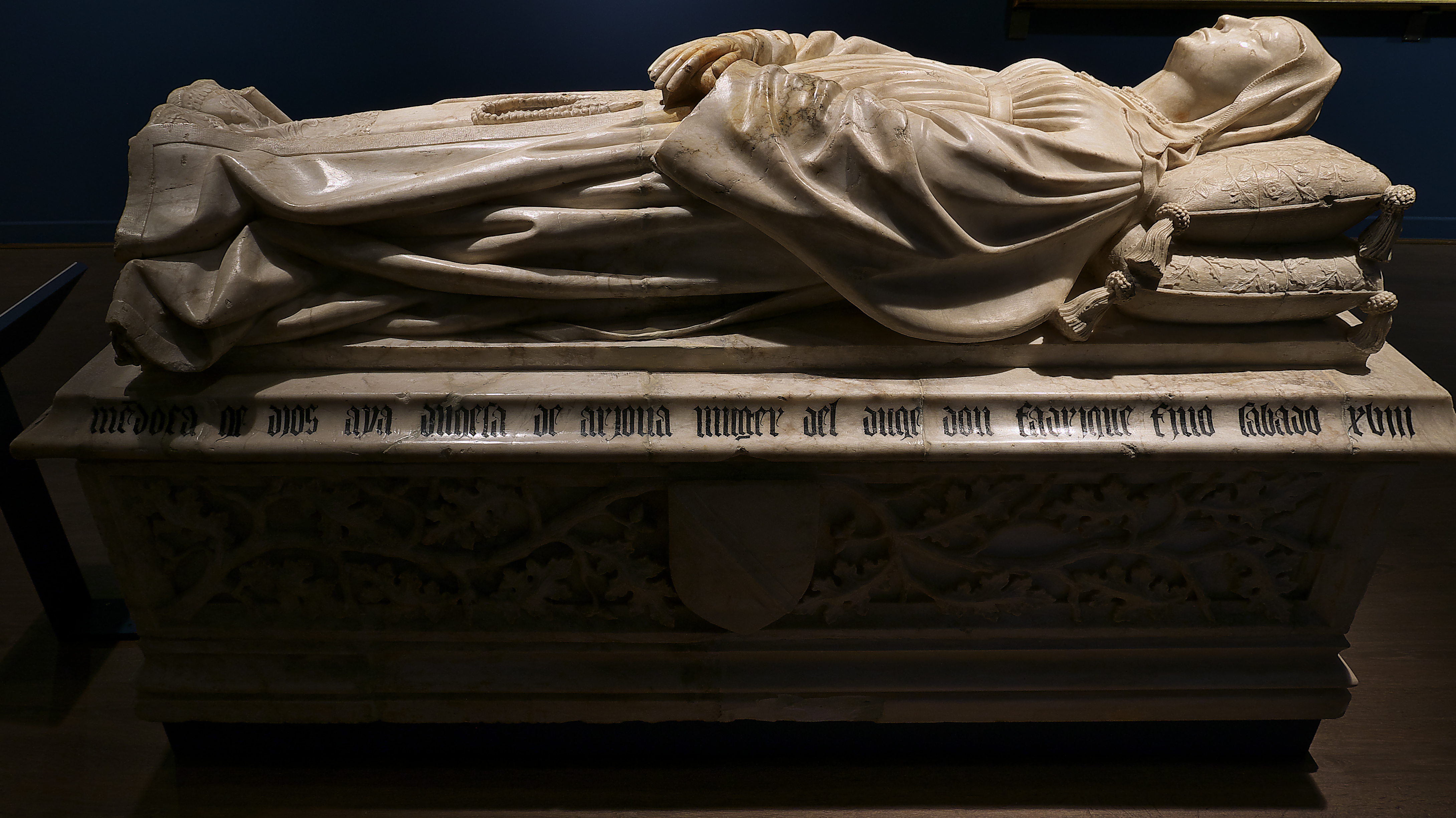 Sepulcro de alabastro. Doña Aldonça de Mendoza (†1435), rica mujer de Fadrique de Castilla y Castro, I Duque de Arcos. Procedente del Monasterio de San Bartolomé de Lupiana.